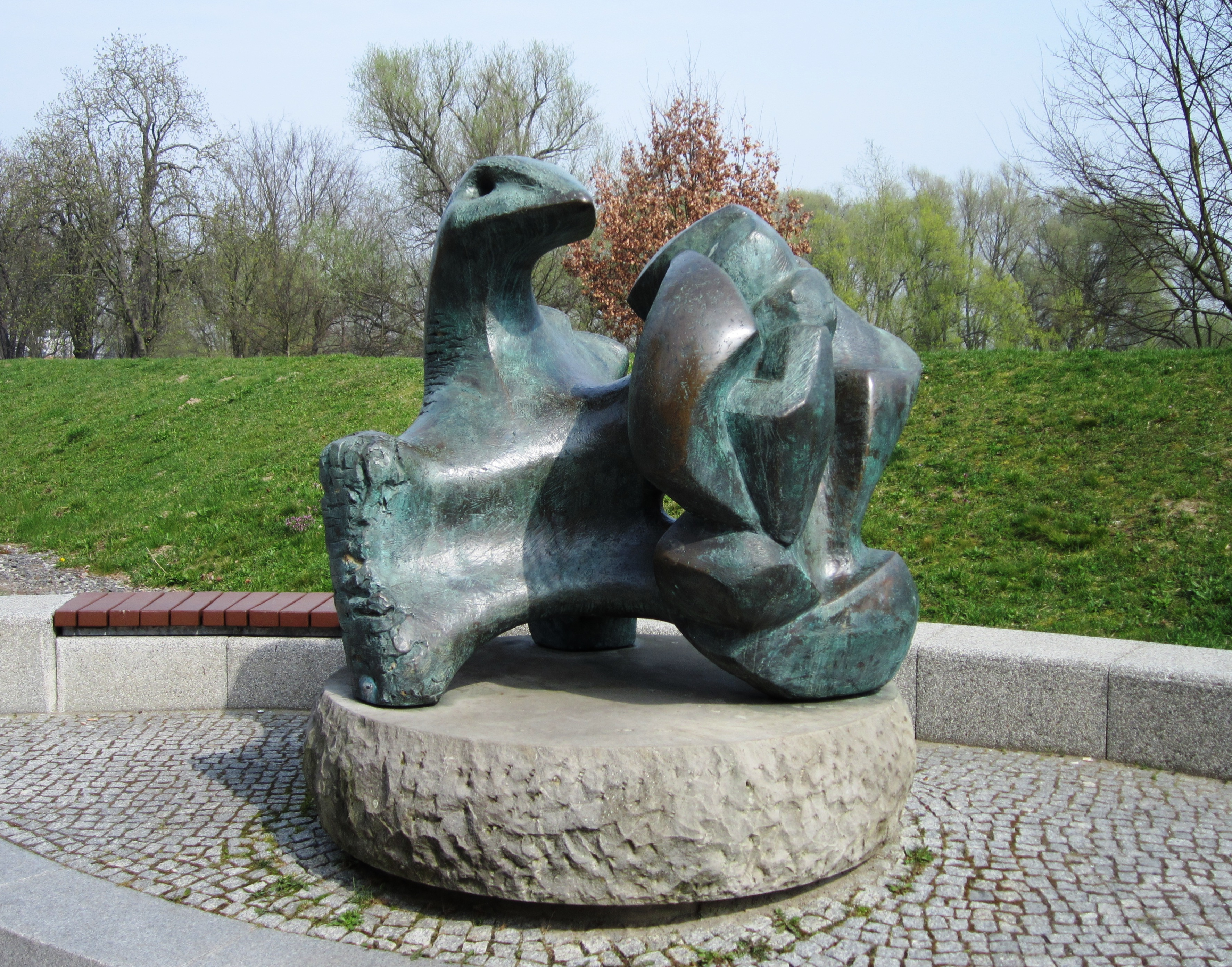 Skulptur "Phoenix" von Roland Rother in Frankfurt (Oder)